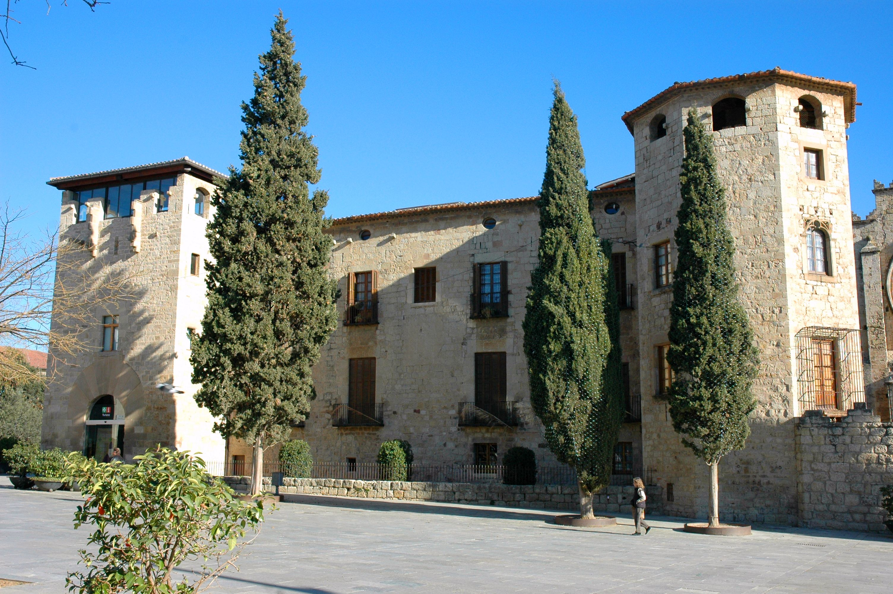 Monestir de Sant Cugat - Palau abacial